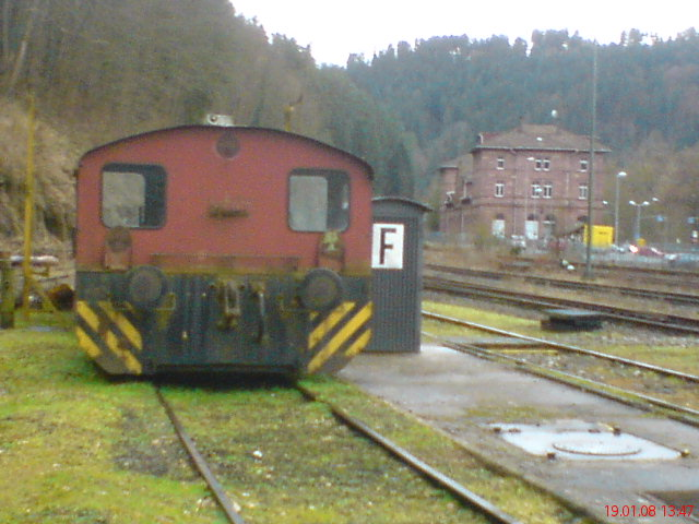 Rückseite der Diesel-Kleinlok Köf II im Bw Calw vor dem alten Bahnhof Calw